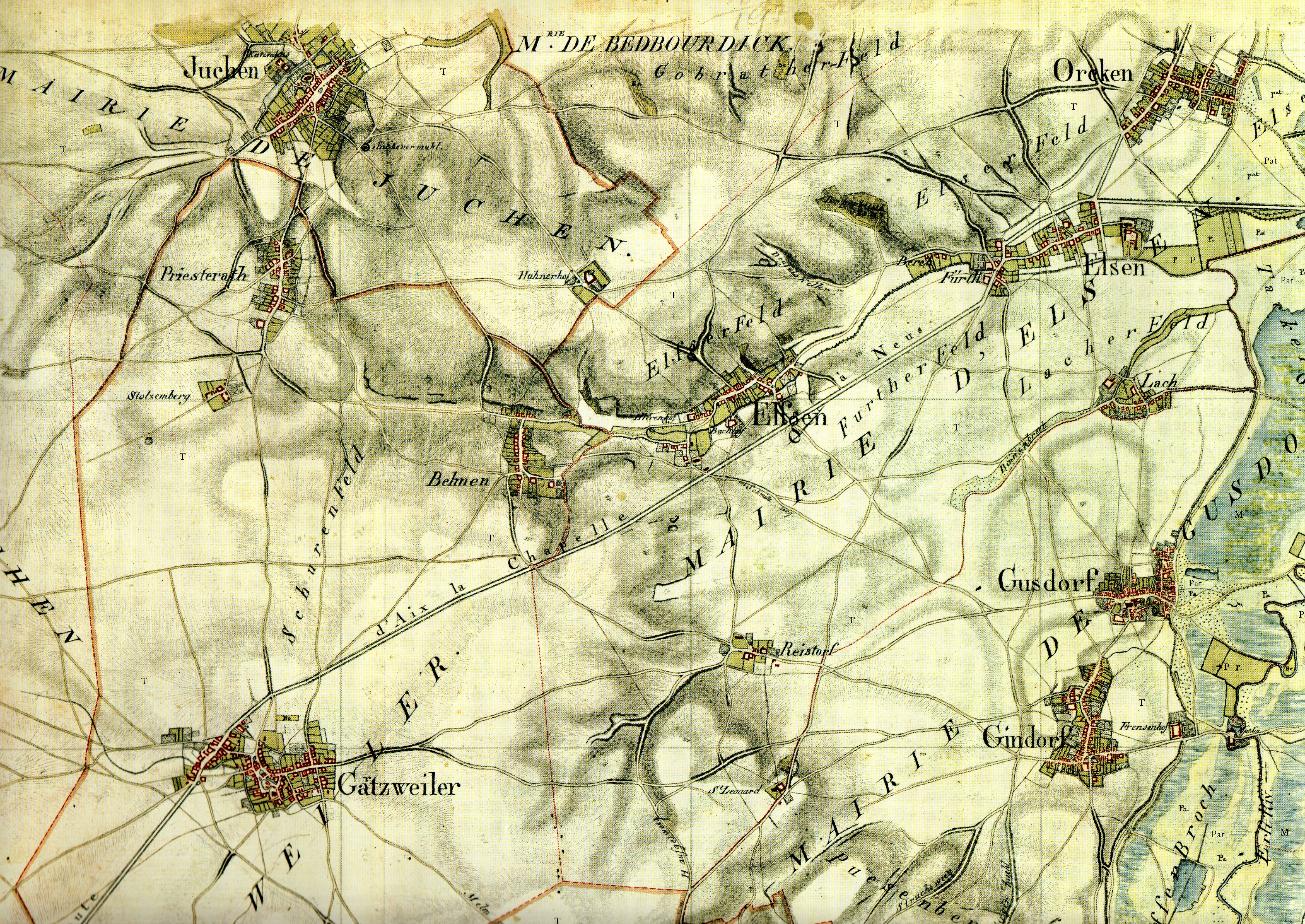 Kartenaufnahme der Rheinlande durch Tranchot und von Müffling